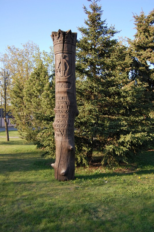 Paminklinis stulpas Vabalninke